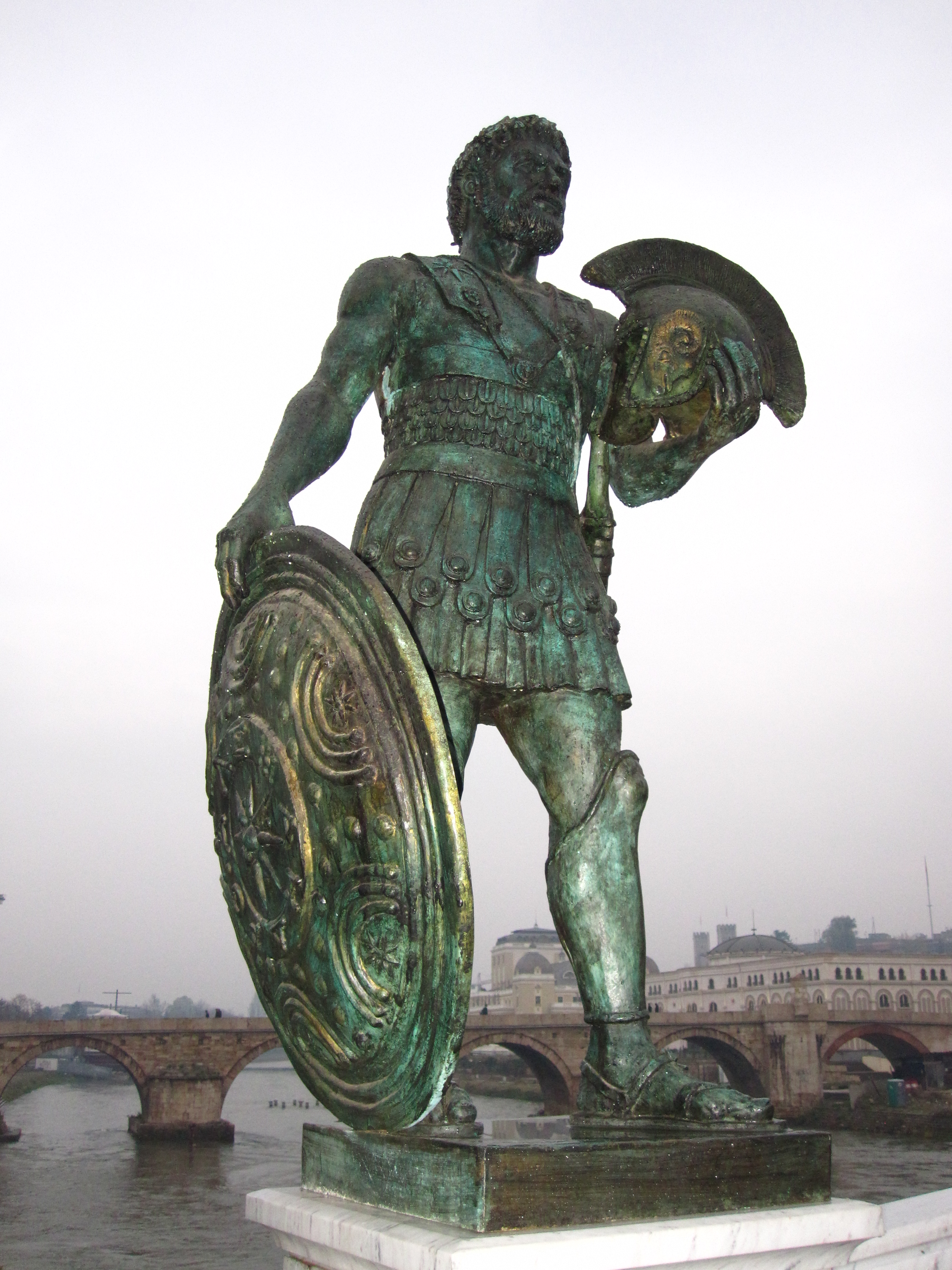 Споменик - Александар 1 Филхелен - Скопје.